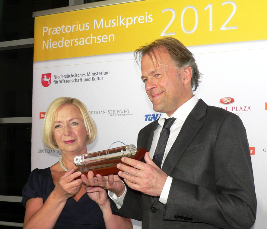 Thomas Hengelbrock bei der Verleihung des Praetorius Musikpreis mit Ministerin Wanka